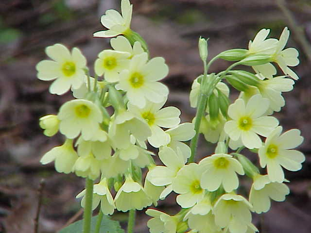 Species: Primula elatior Family: Primulaceae Image No. 1